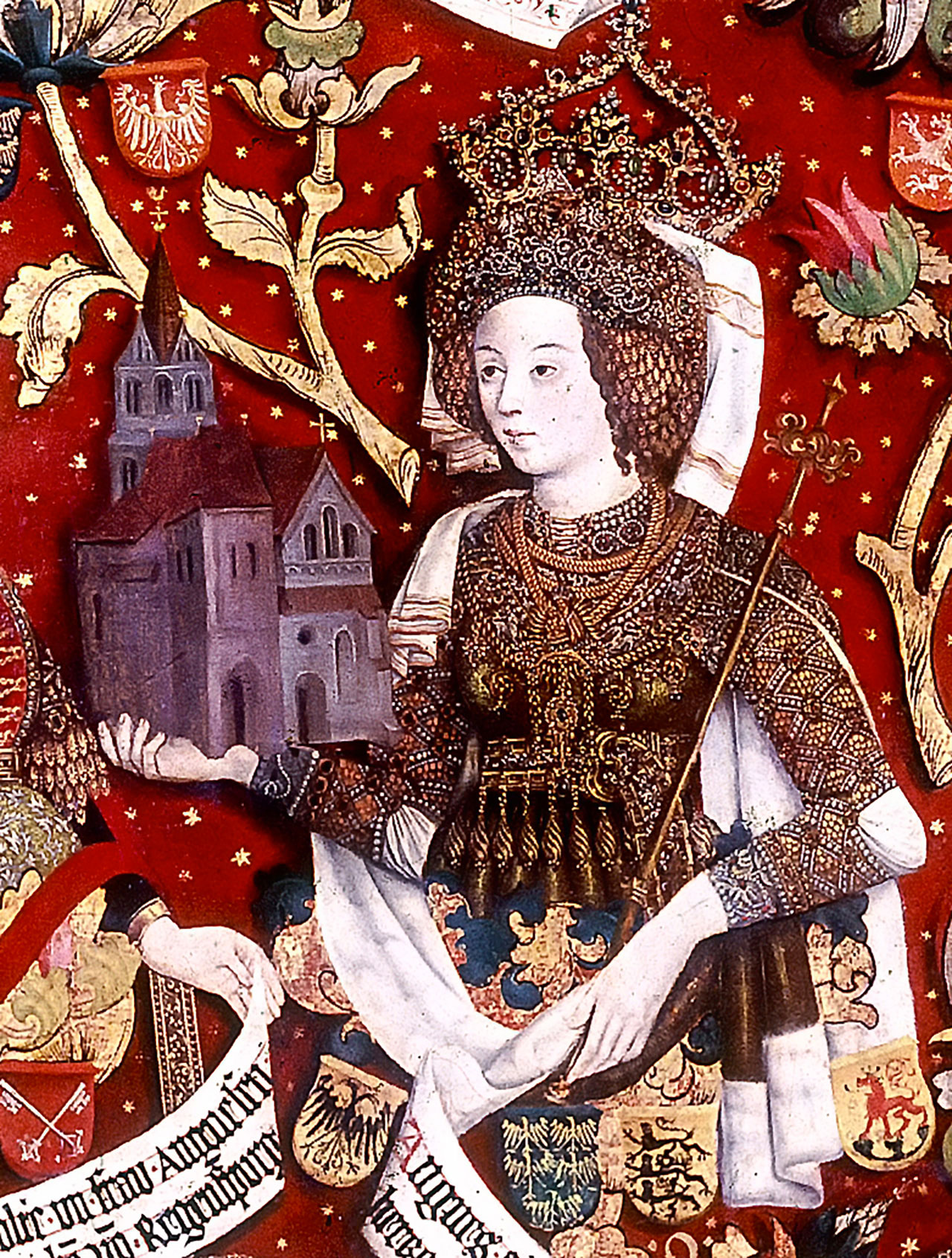 Markgräfin Agnes, Gattin Markgraf Leopold III. (Babenberger Stammbaum, Stift Klosterneuburg)